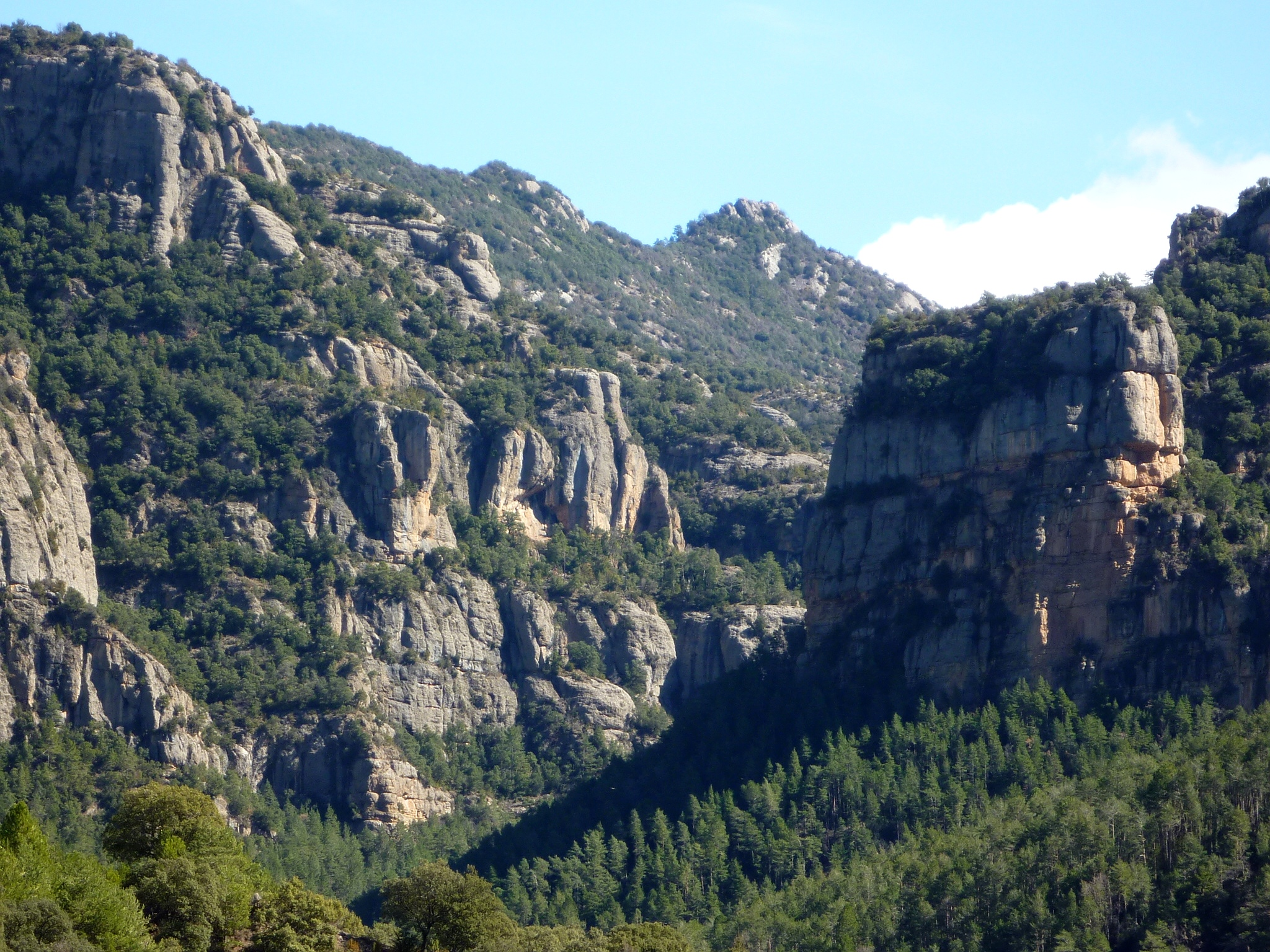 La rasa de les Fraus de Vilella des des del Pujol de la Vall d'Ora (Navès - Solsonès) This is a a photo of a natural area in Catalonia, Spain, with id: ES510187